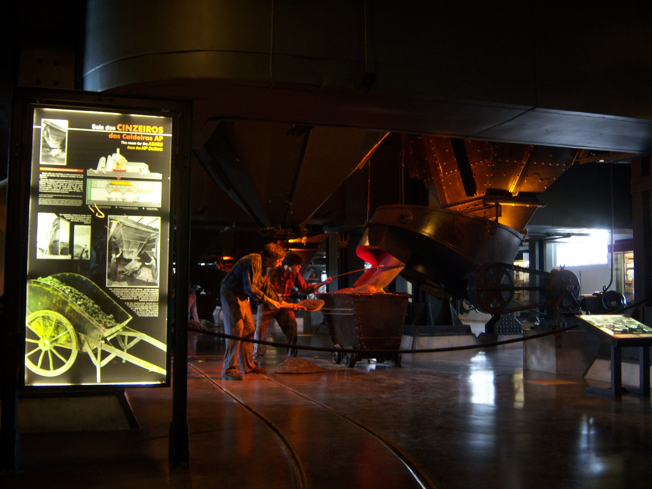 Sala dos Cinzeiros ao rés-do-chão do prédio das Caldeiras de Alta Pressão. Museu da Electricidade.